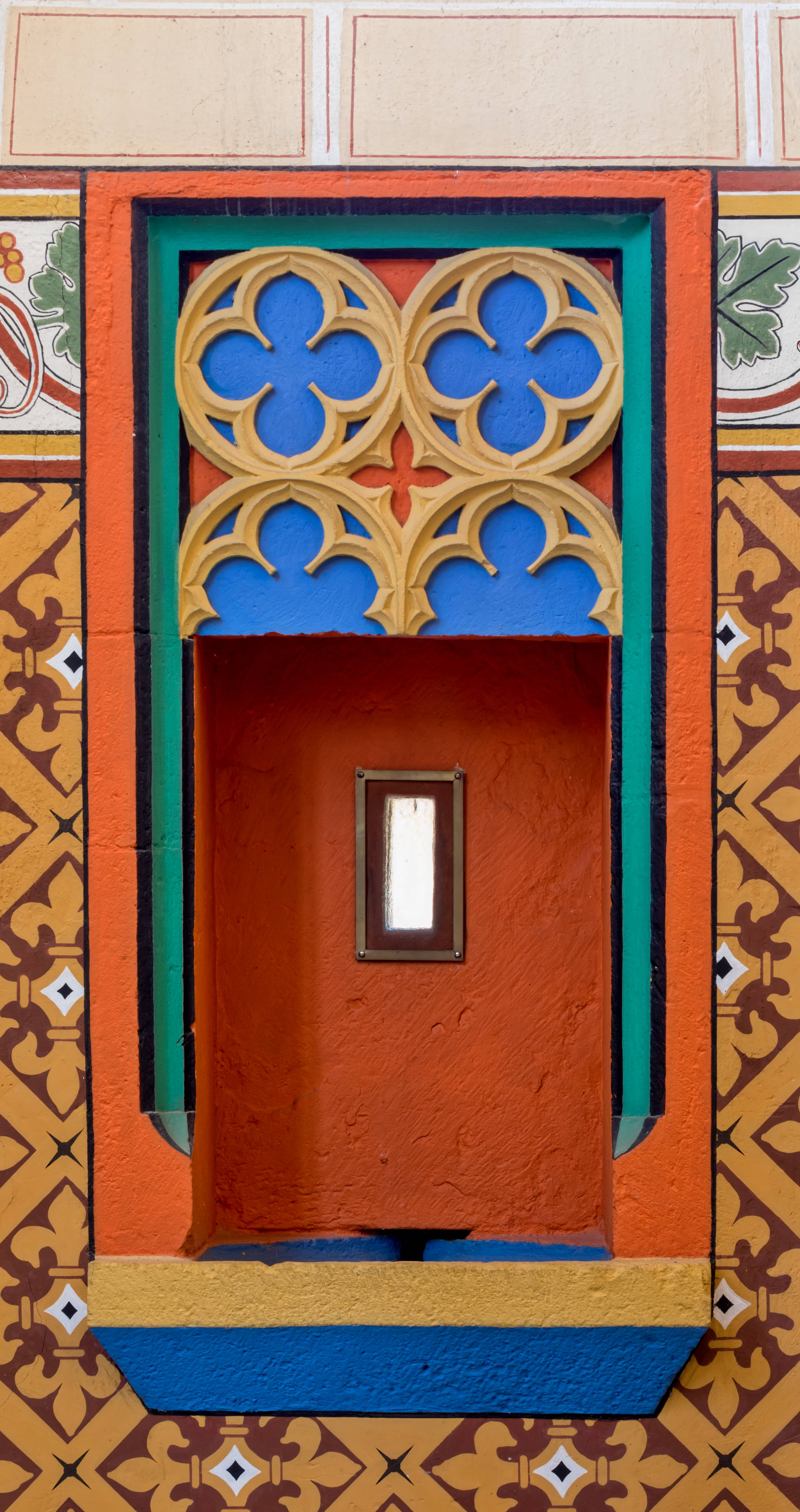 St. Aegidien in St. Ilgen einem Teilort von Laufen Abfluß im Chor